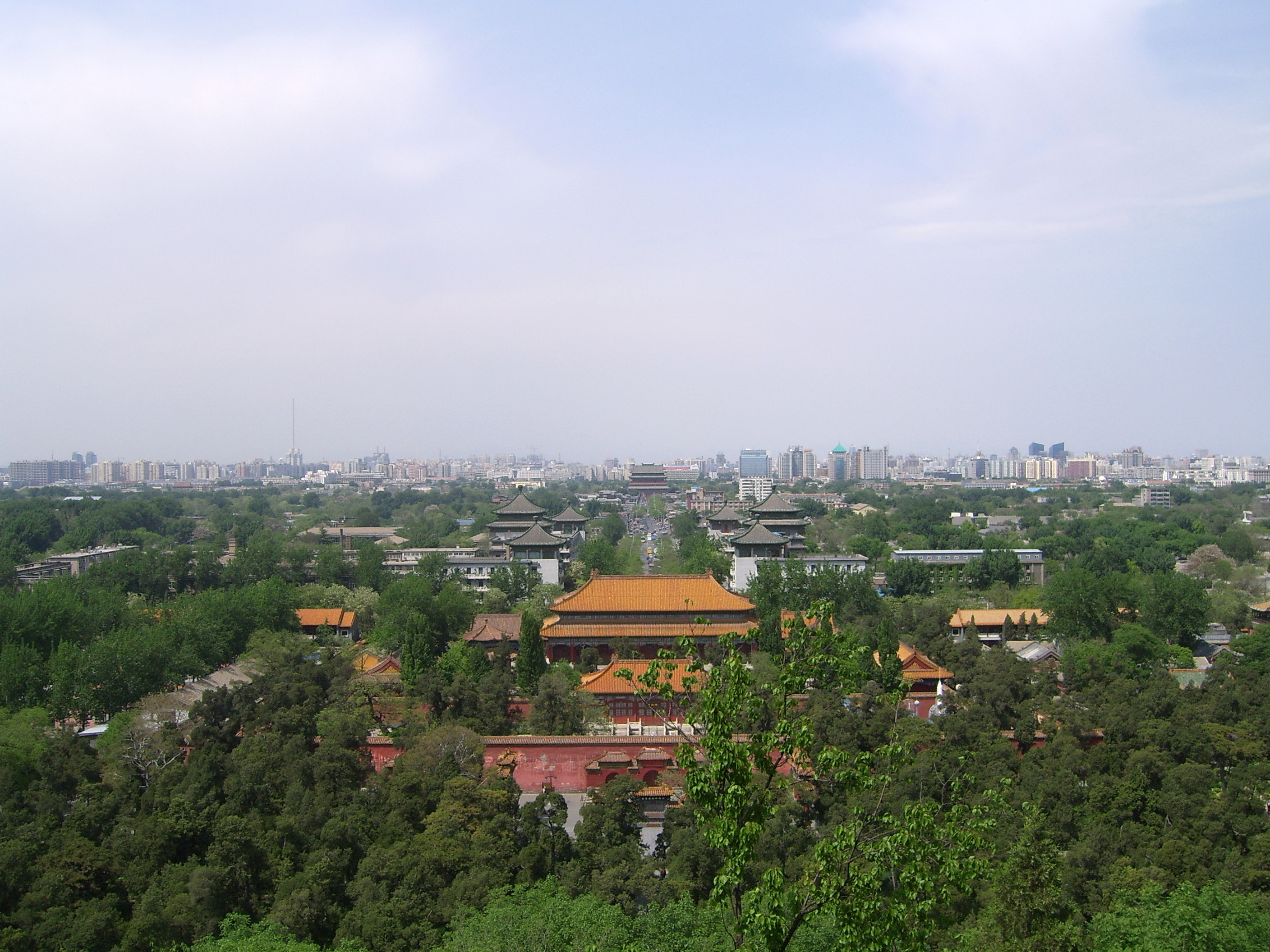 从景山最高处望北京中轴线，最远处是钟鼓楼